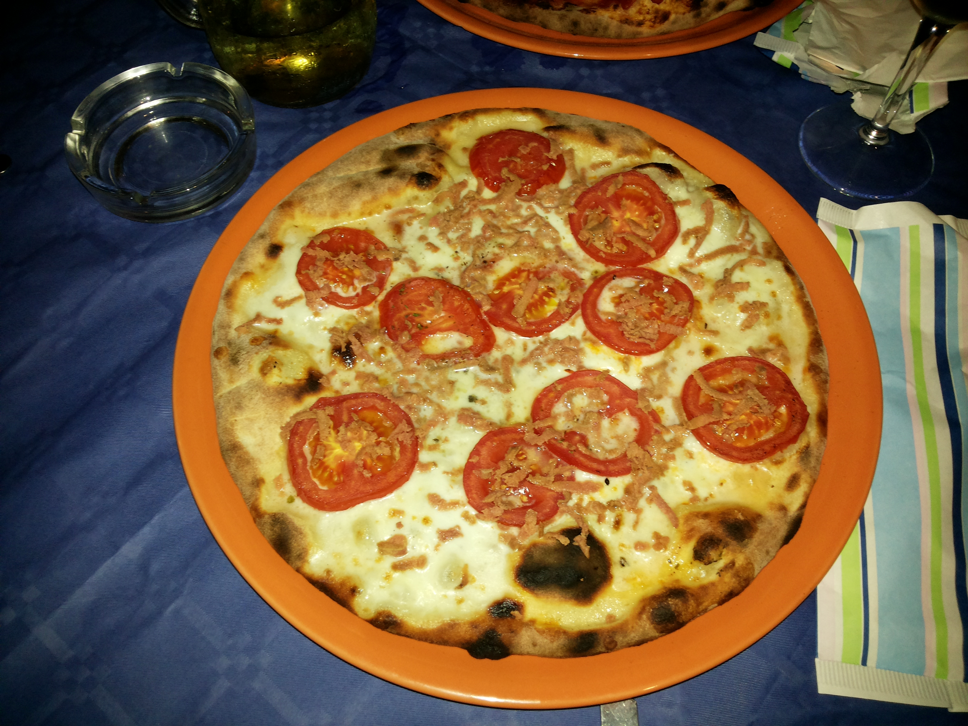 Pizza con bottarga di tonno (Pizzeria Bellavista - Castellammare del Golfo)